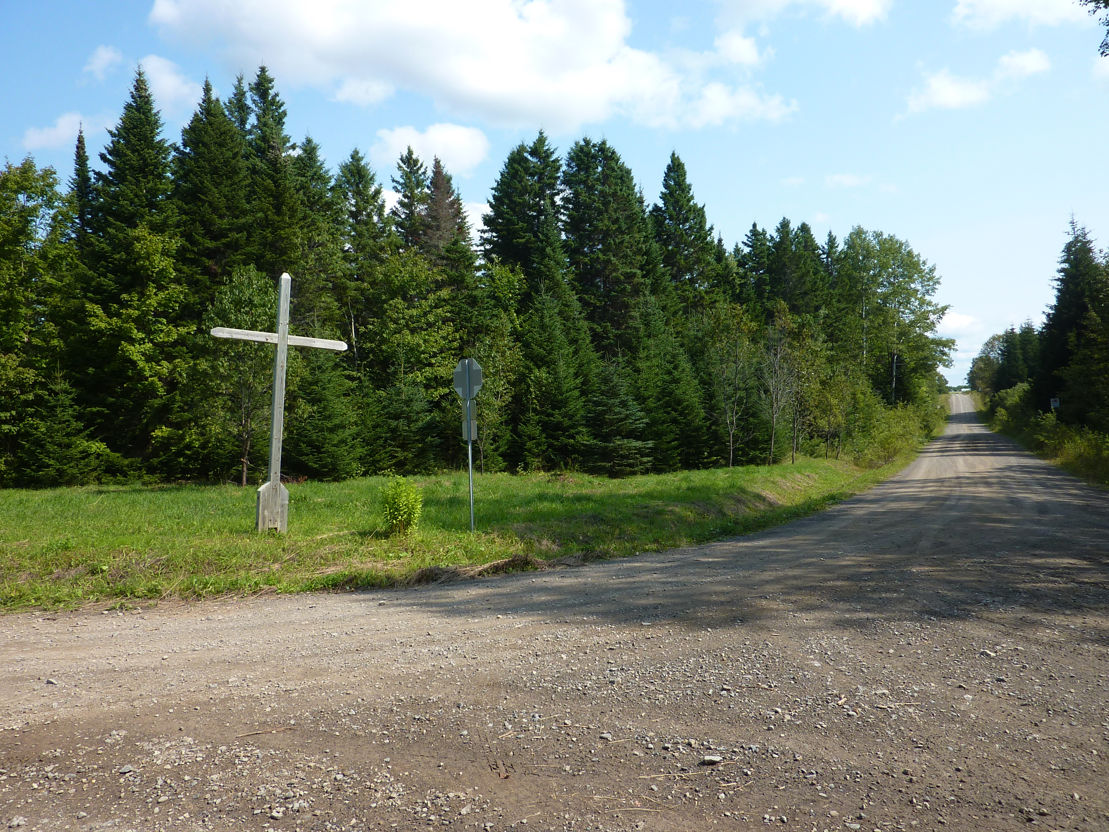 Croix de chemin à l'intersection de deux chemins de terre à Saint-Vianney